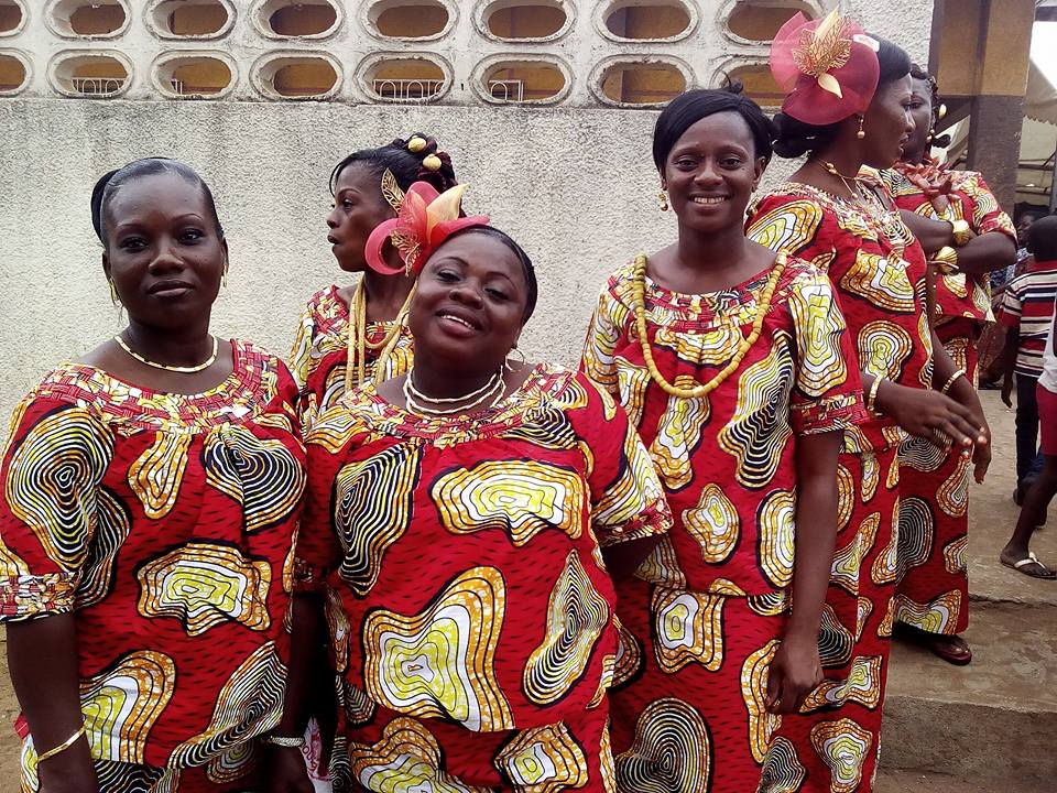 Femmes de la Catégorie Blessoué Dogba du village d'Abobo-Doumé en uniforme en pagne avec pour couleurs dominantes le rouge et le jaune. This is an image of Cultural Fashion or Adornment from Ivory Coast